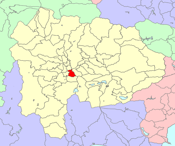 山梨県東八代郡豊富村の位置画像。